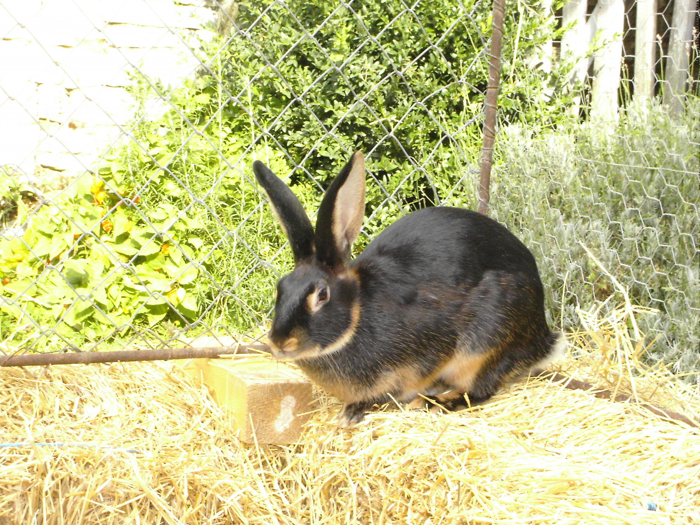 lapin chèvre, espèce domestique rare; rabbit